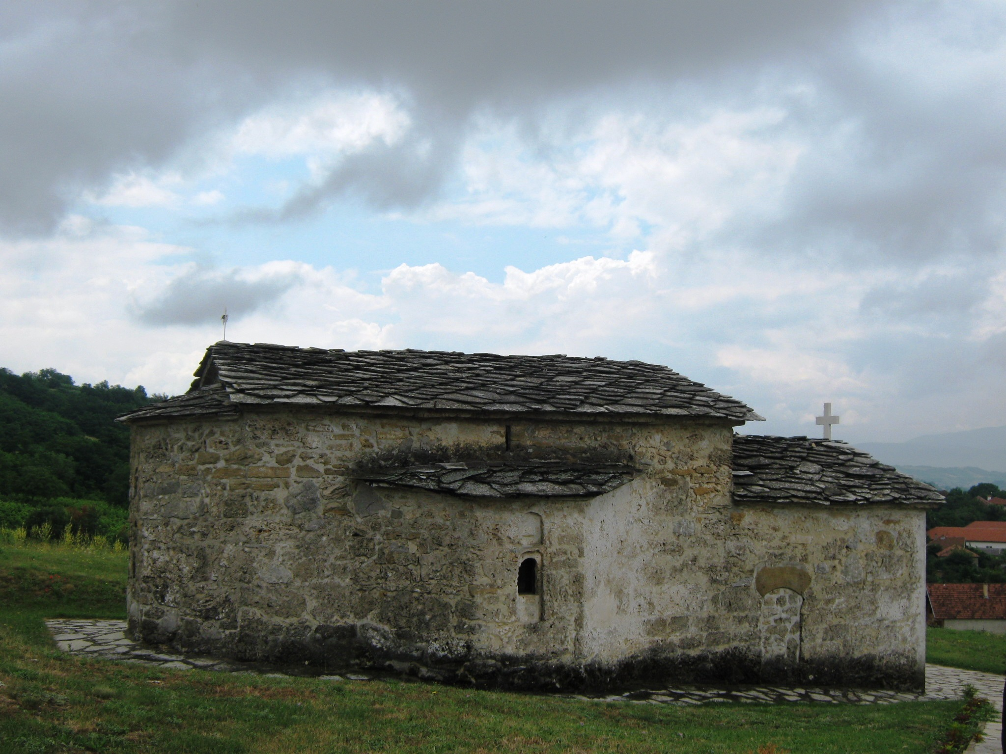 Srpskohrvatski / српскохрватски: Косово и Метохија